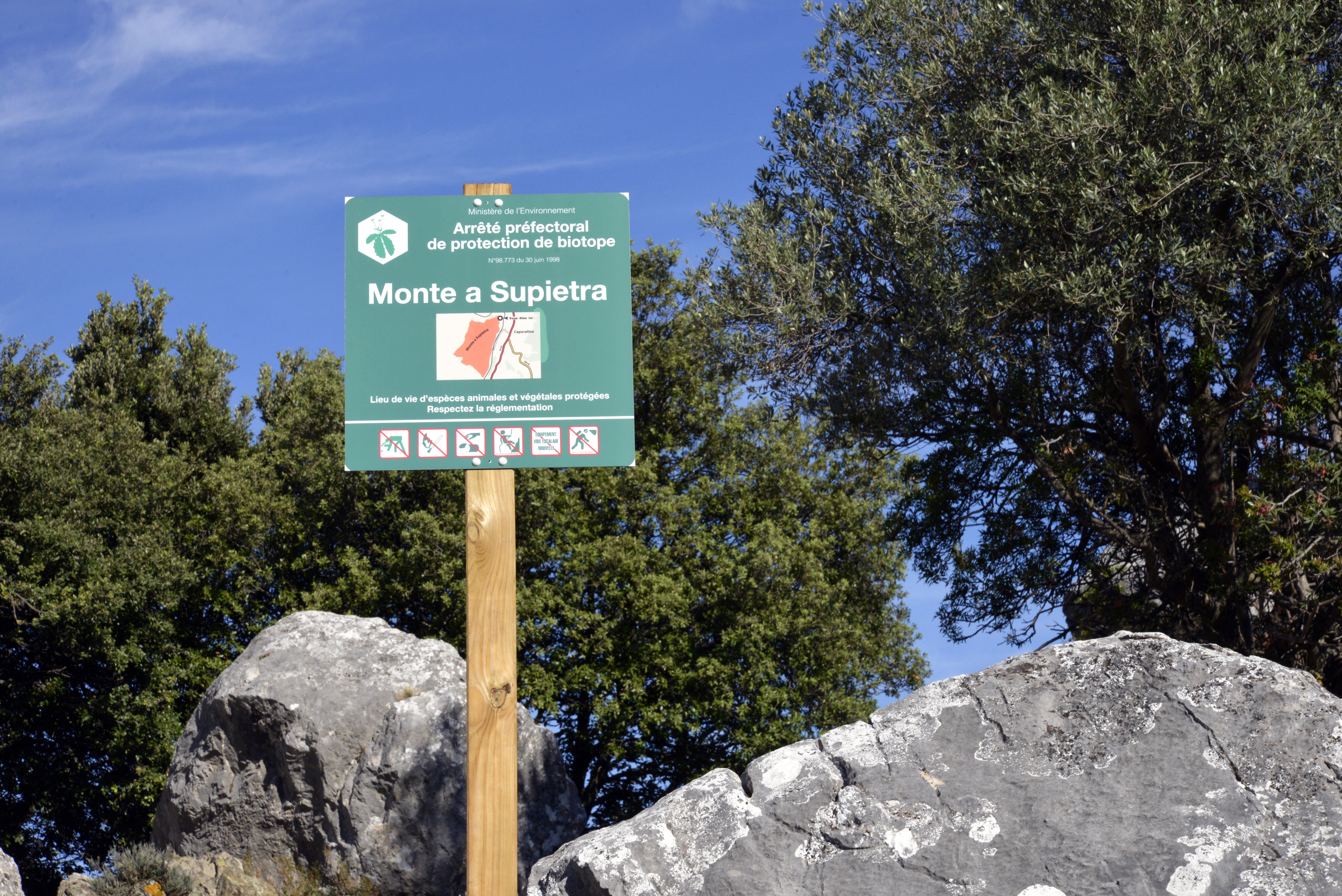 Omessa, Talcini (Haute-Corse) - Panneau « Arrêté préfectoral de protection de biotope Monte a Supietra »